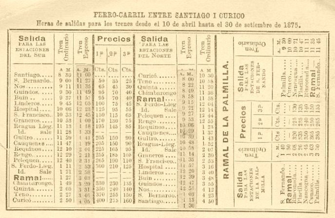 pasaje de tren 1875